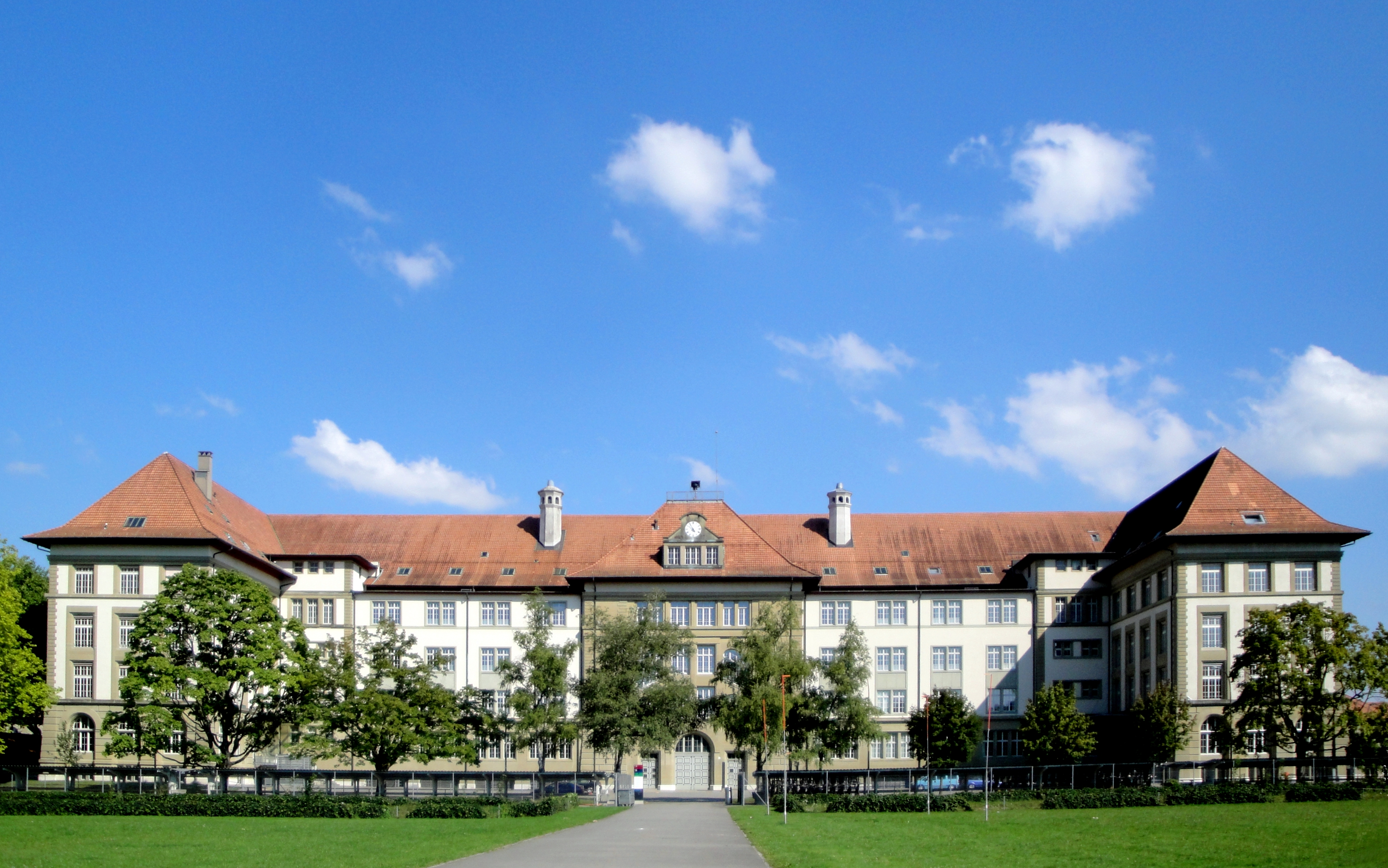 Bern, Kantonale Militäranstalten, Papiermühlestrasse 15 (Seite West)